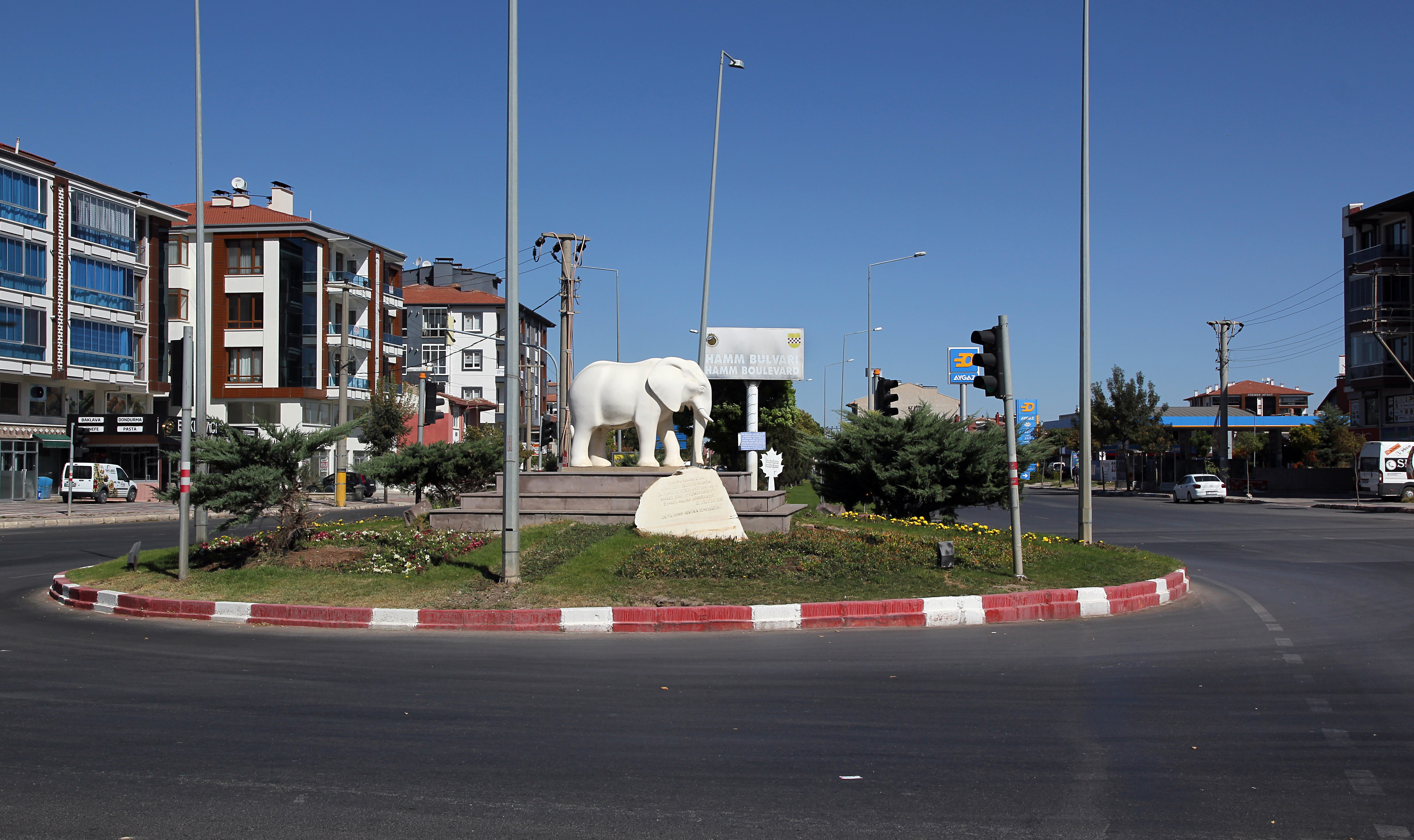 Elefantenskulptur am Hamm Bulvarı in Afyonkarahisar, Zentraltürkei, Partnerstadt von Hamm, Deutschland